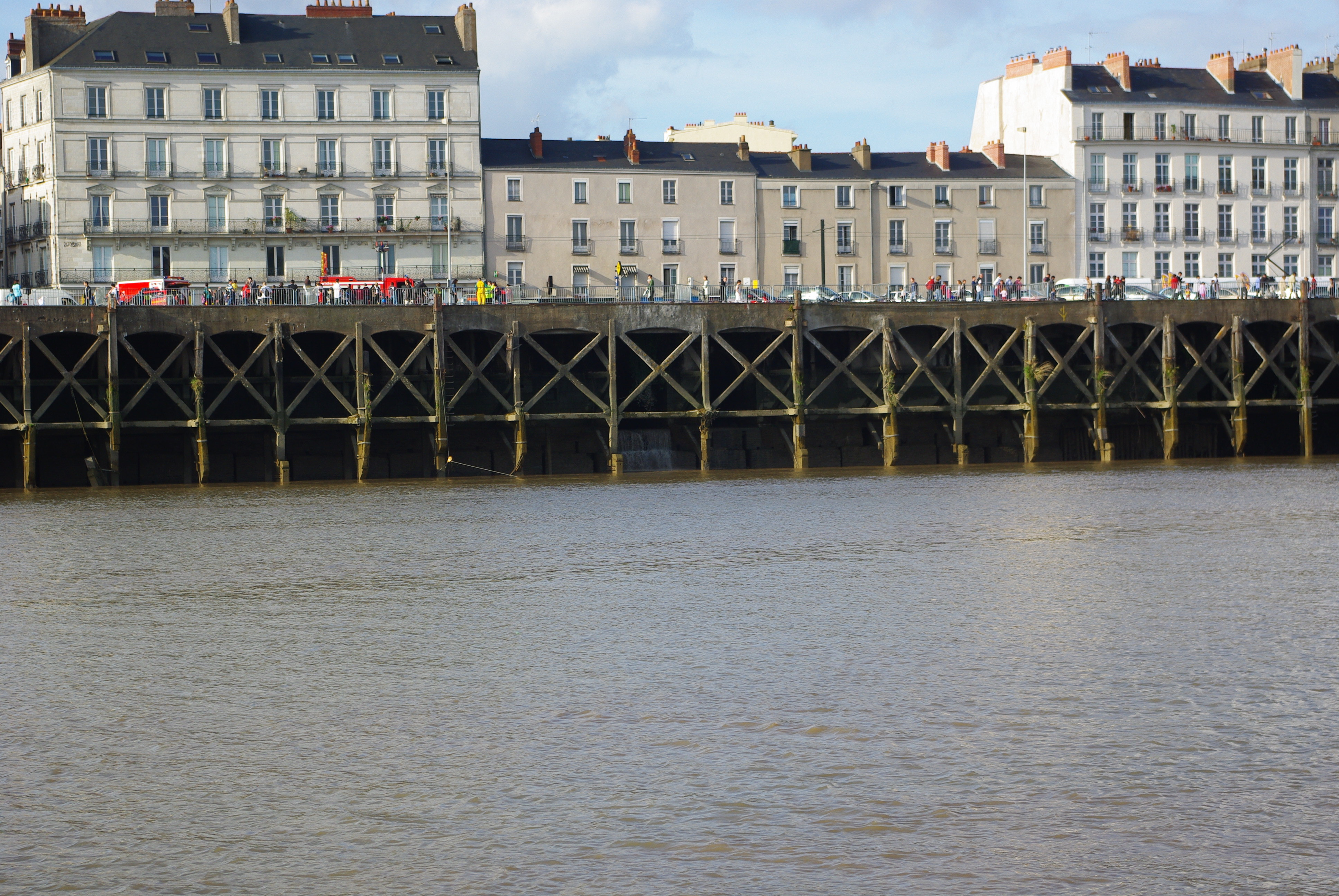 Sortie de la Chézine au niveau du Quai de la Fosse, à marée basse.